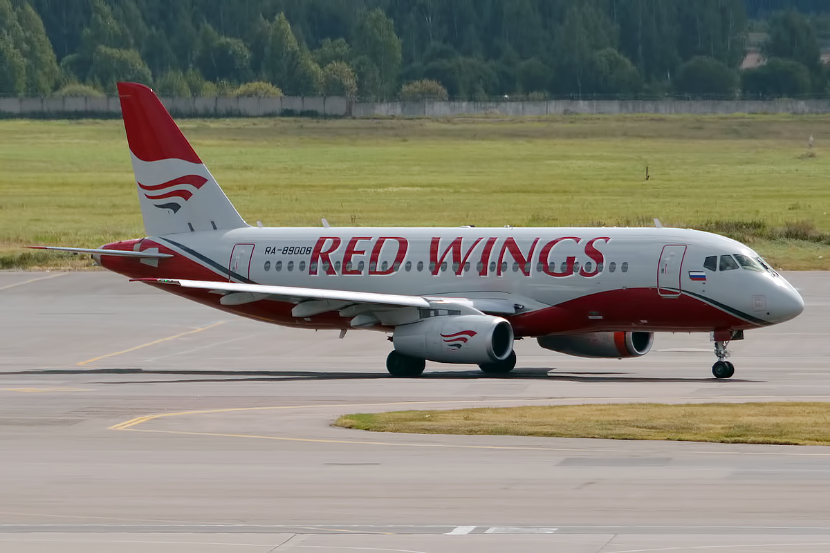 Red Wings, RA-89008, Sukhoi Superjet 100-95B